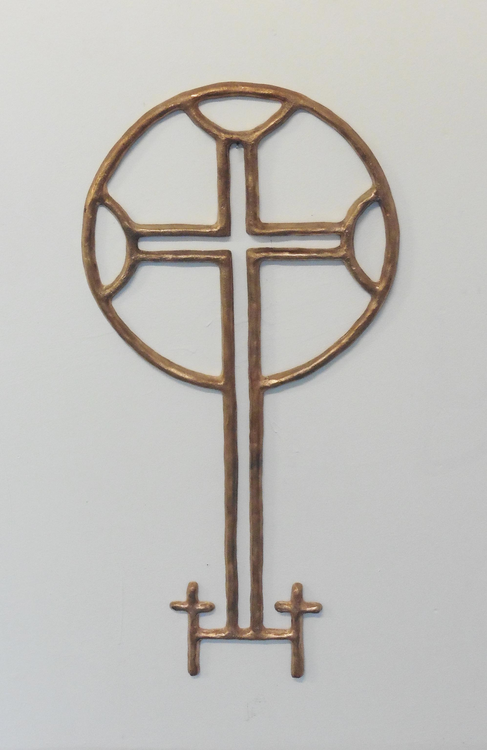 Carel Lanters 2016: reconstructie van een vroegchristelijk kruis in een steenplaat gevonden in Cill na seacht nInion, Inis Oirr, brons, hoogte 82 cm